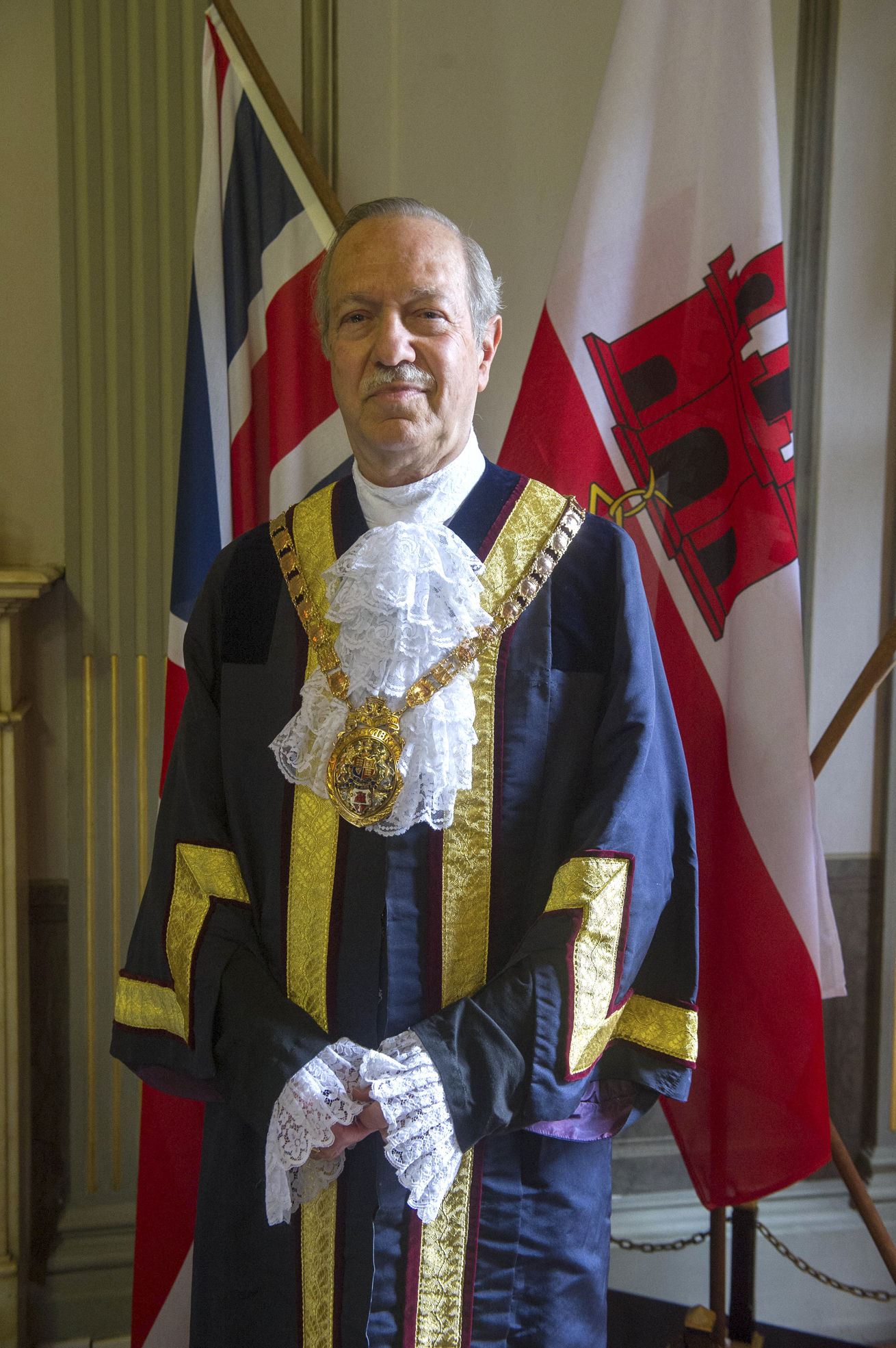 Investidura Adolfo Canepa como nuevo alcalde15